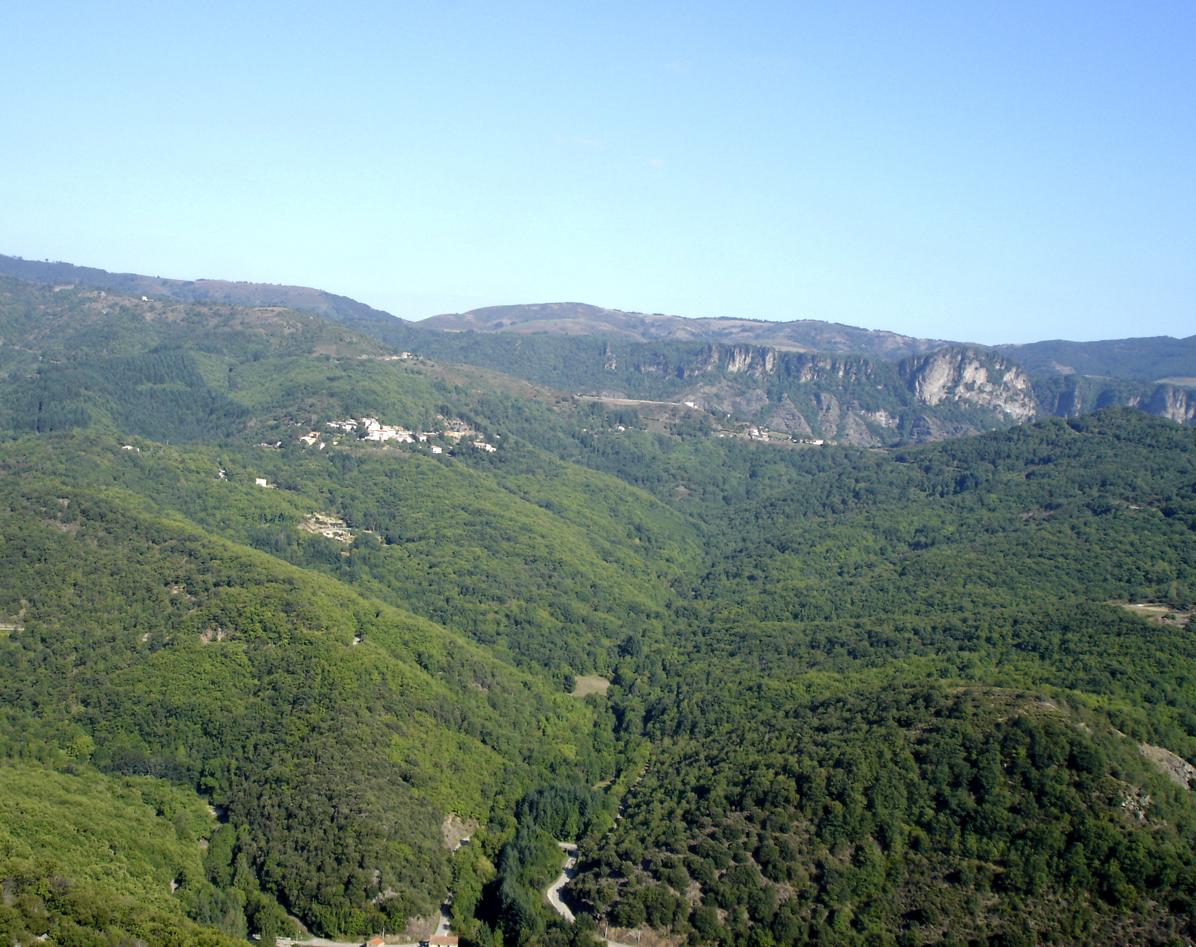 Castanet-le-Haut (Hérault) - Vue sur les falaises d'Olque, les hameaux du Nougayrol, Pabau, Moulières, le Péras, Belair, la Croix de Mounis.